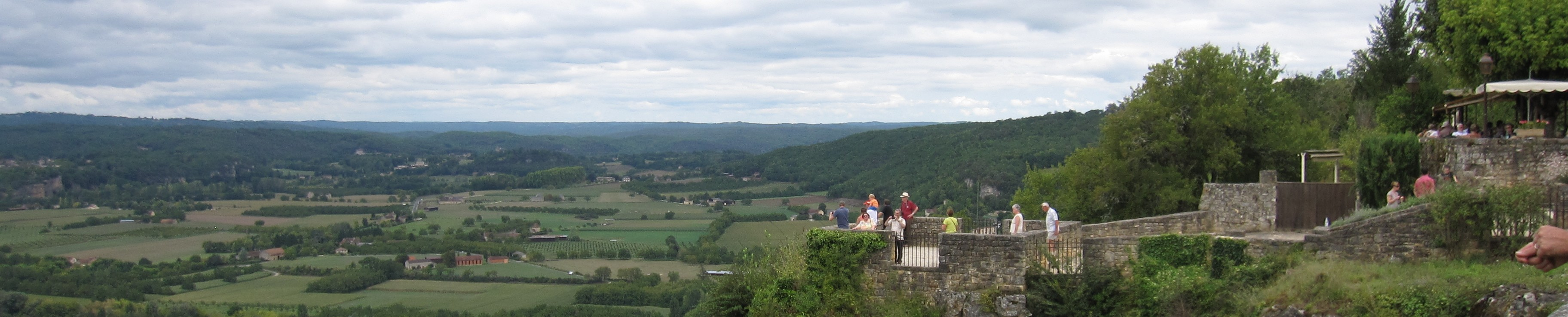 Vue panoramique de Domme